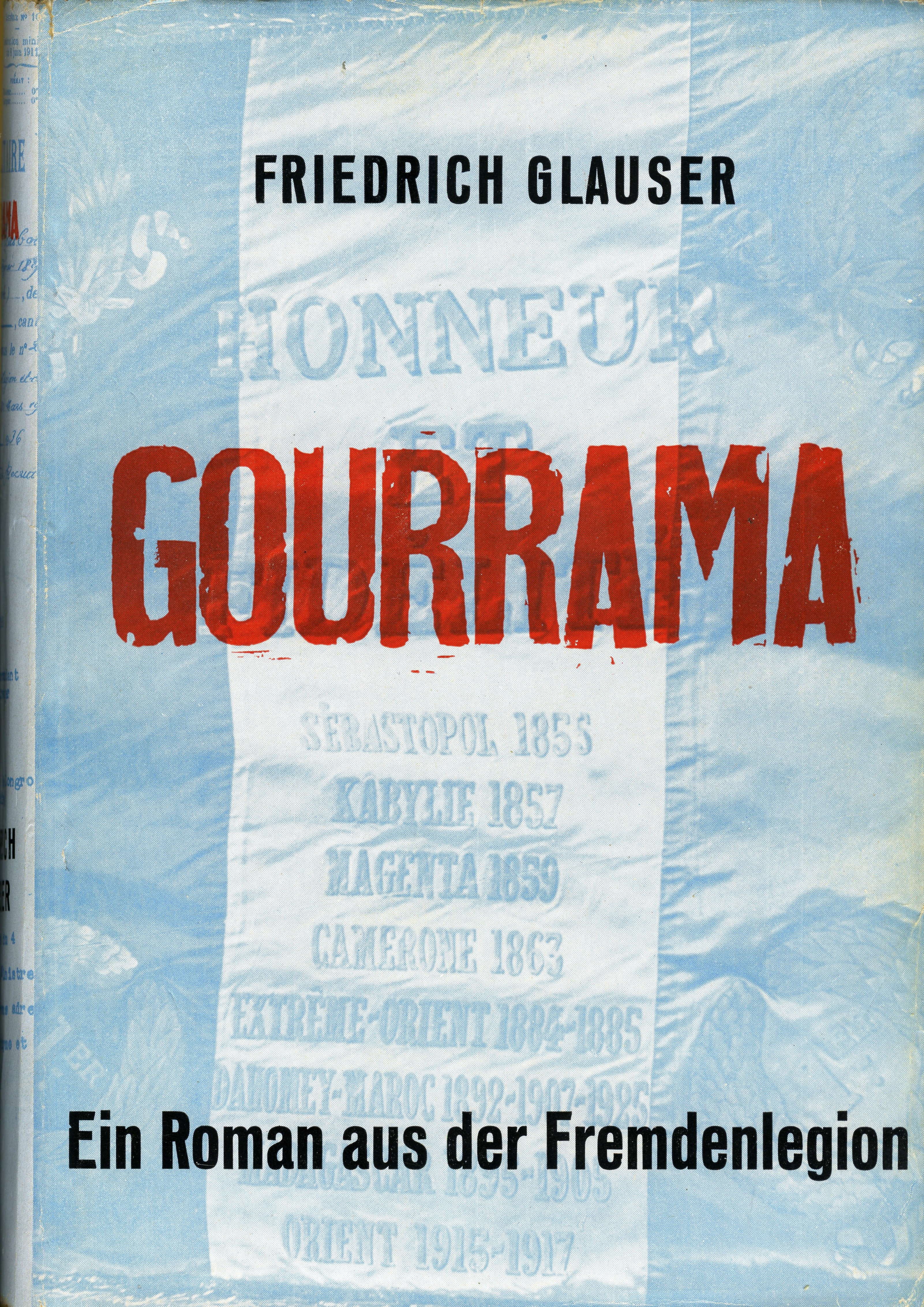 „Gourrama“ in der Buchausgabe (mit SU) des Schweizer Druck- und Verlagshaus, Zürich 1941. Verlag wurde übernommen vom Oesch Verlag, Zürich